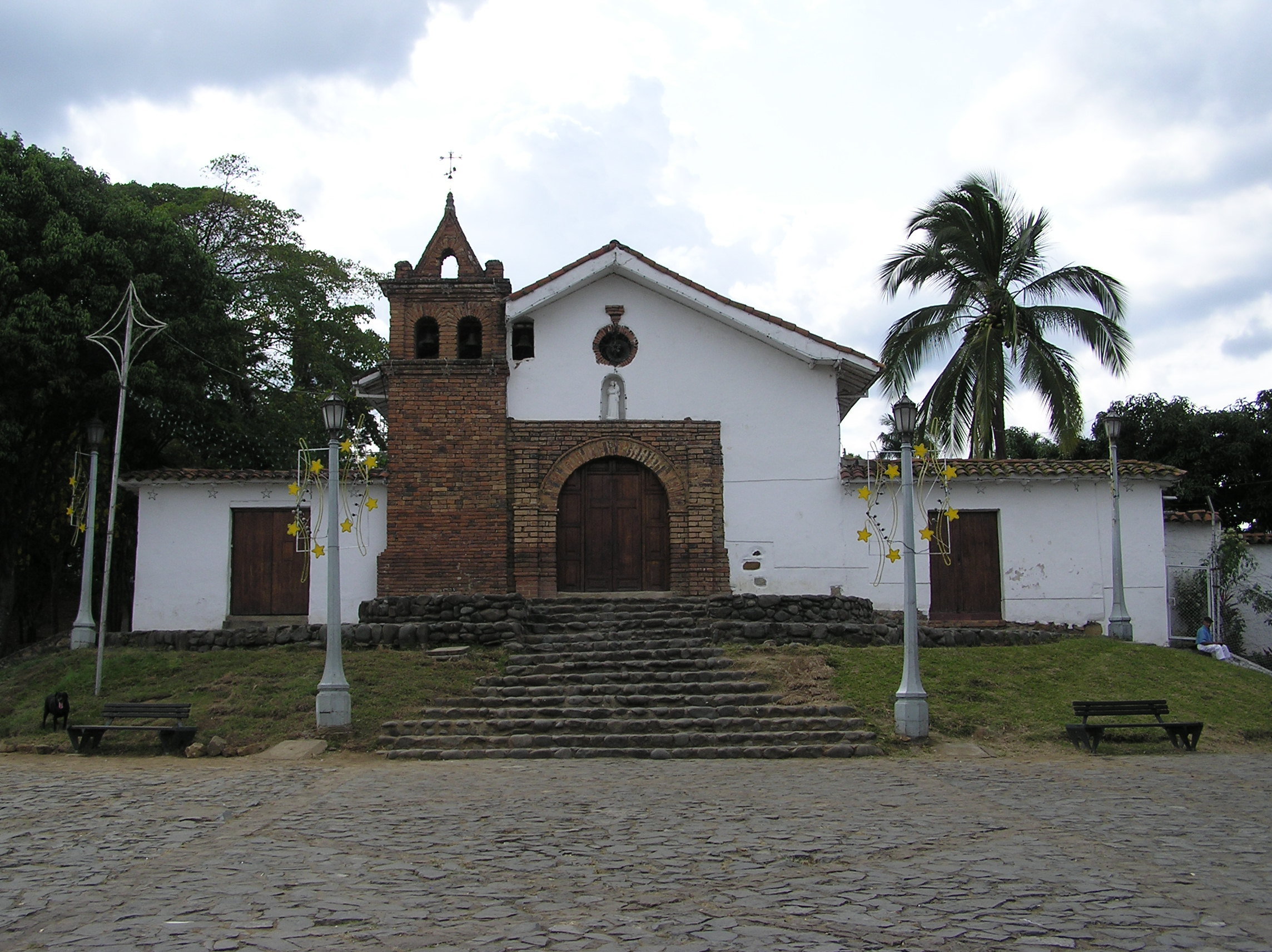 San Antonio Church Santiago de Cali - Colombia